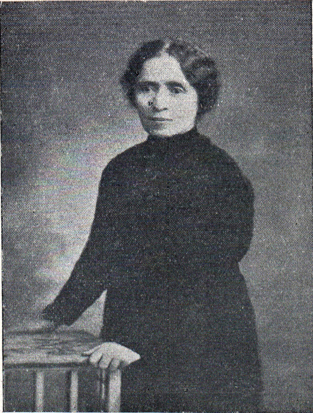 Захария Шумлянска.